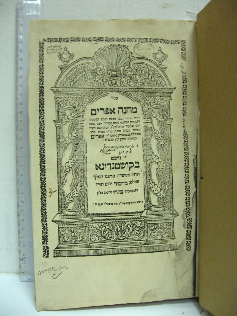 עטיפת ספרו של הרב he:אפרים נבון, מחנה אפרים.